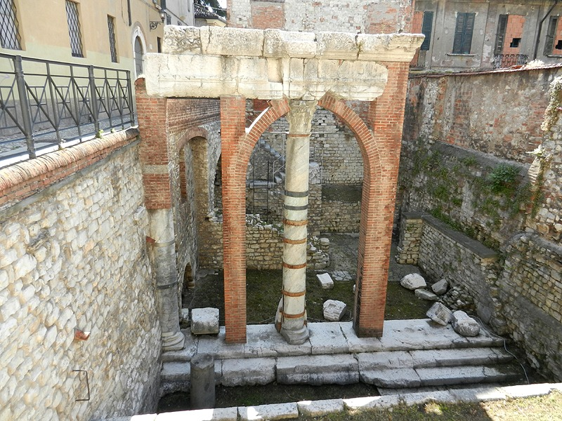 Brescia - Resti del Foro romano